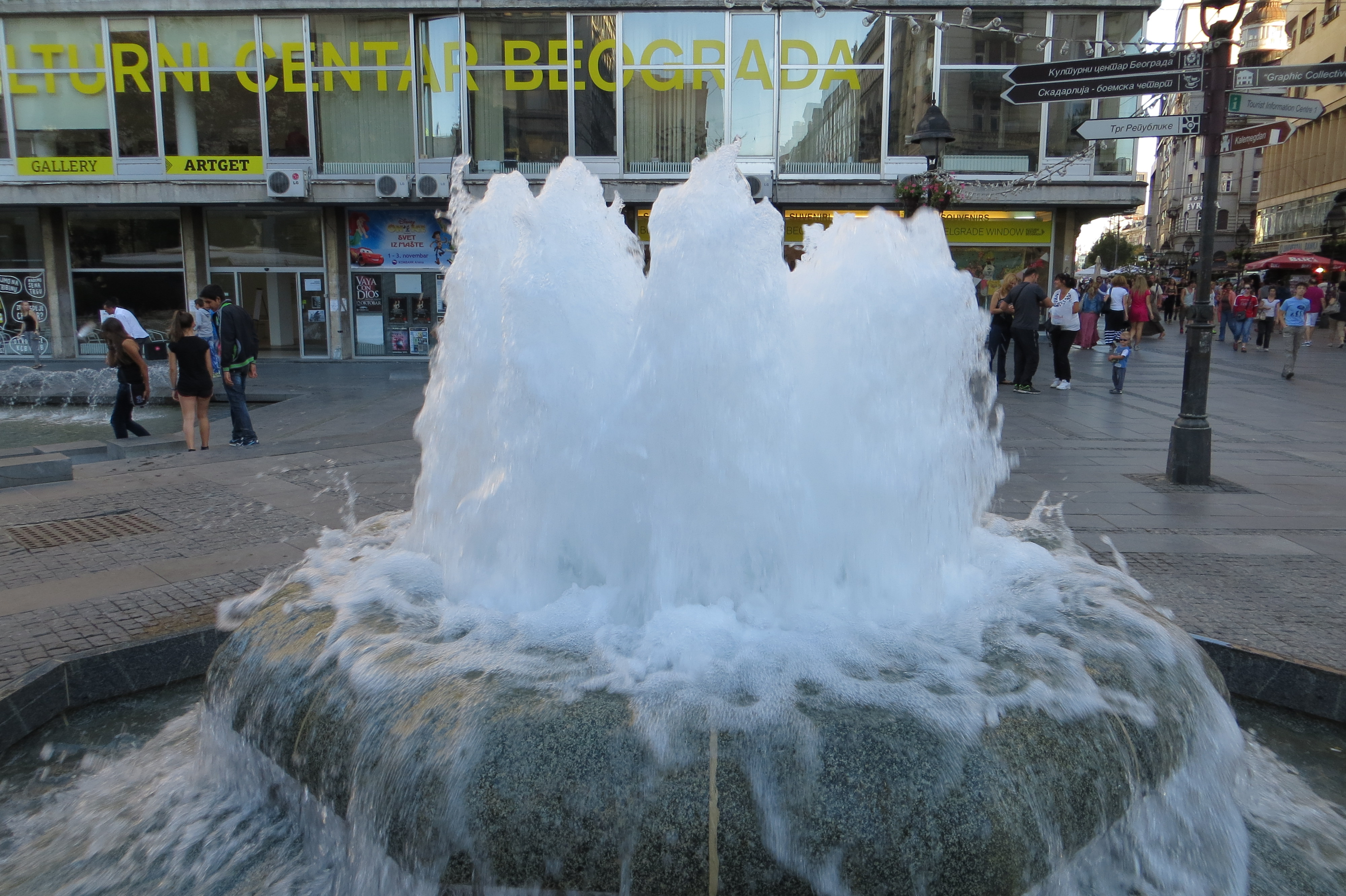 Knez Mihajlova